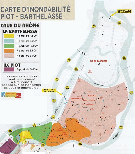 Plan des zones inondables par niveau de crue de la Barthelasse et de l'ïle Piot d'après les observation fournis par le SDIS et communiqués aux administrés par la mairie d'Avignon en 2016